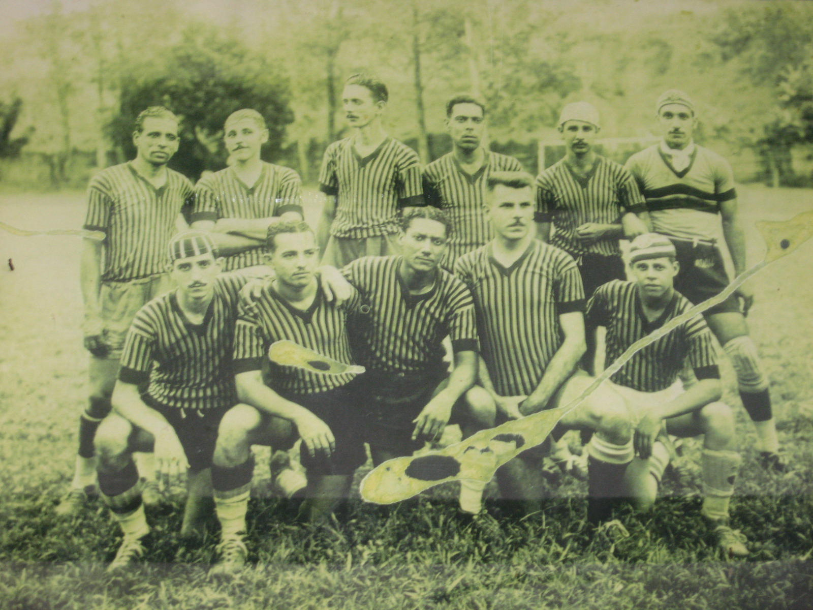 Formação do Tupy SC, de Paracambi, provavelmente dos anos 30.